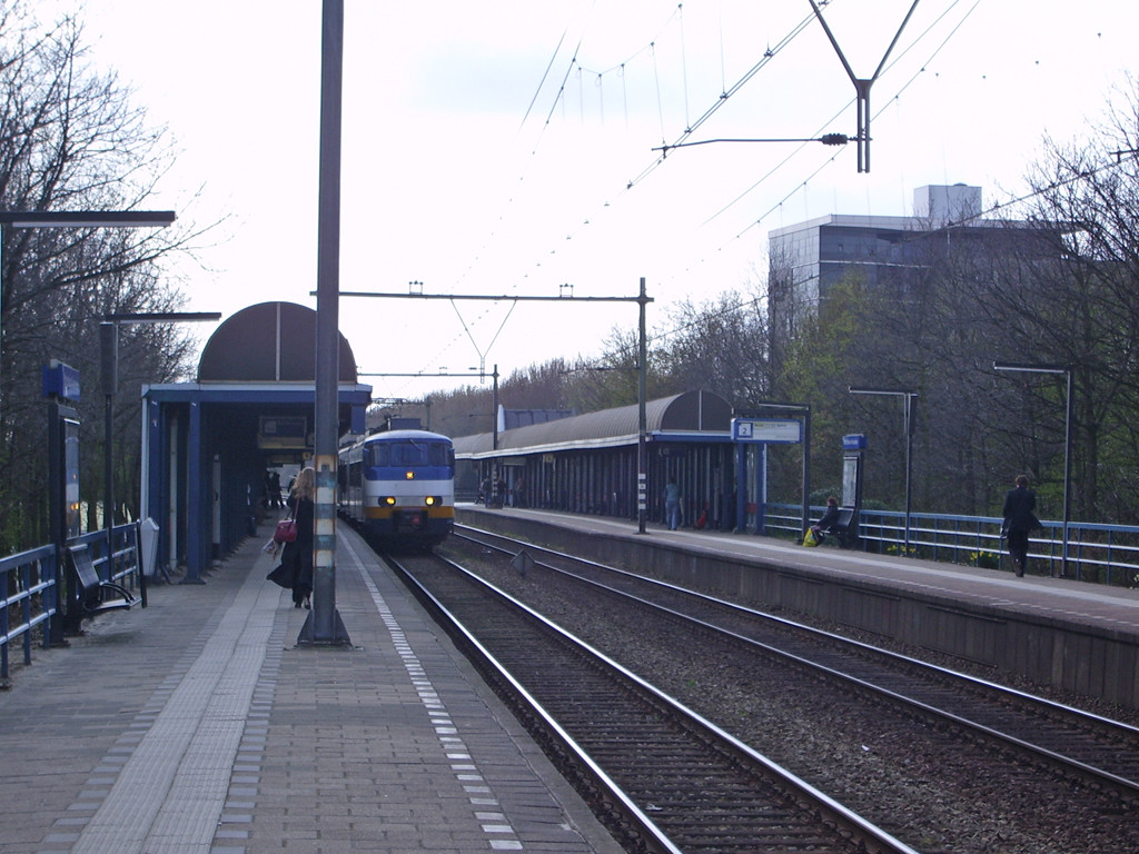 Station Rotterdam Alexander, perrons gezien richting Rotterdam Centraal.